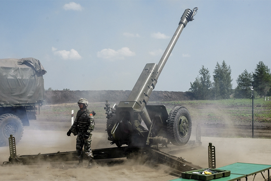 1-й этап конкурса «Мастер-оружейник» — ремонт буксируемой 122-мм гаубицы Д-30. Международный конкурс «Мастер-оружейник» проходил на полигоне «Учебный» Пензенского артиллерийского инженерного института с 1 по 10 августа в рамках Армейских международных игр — 2016.